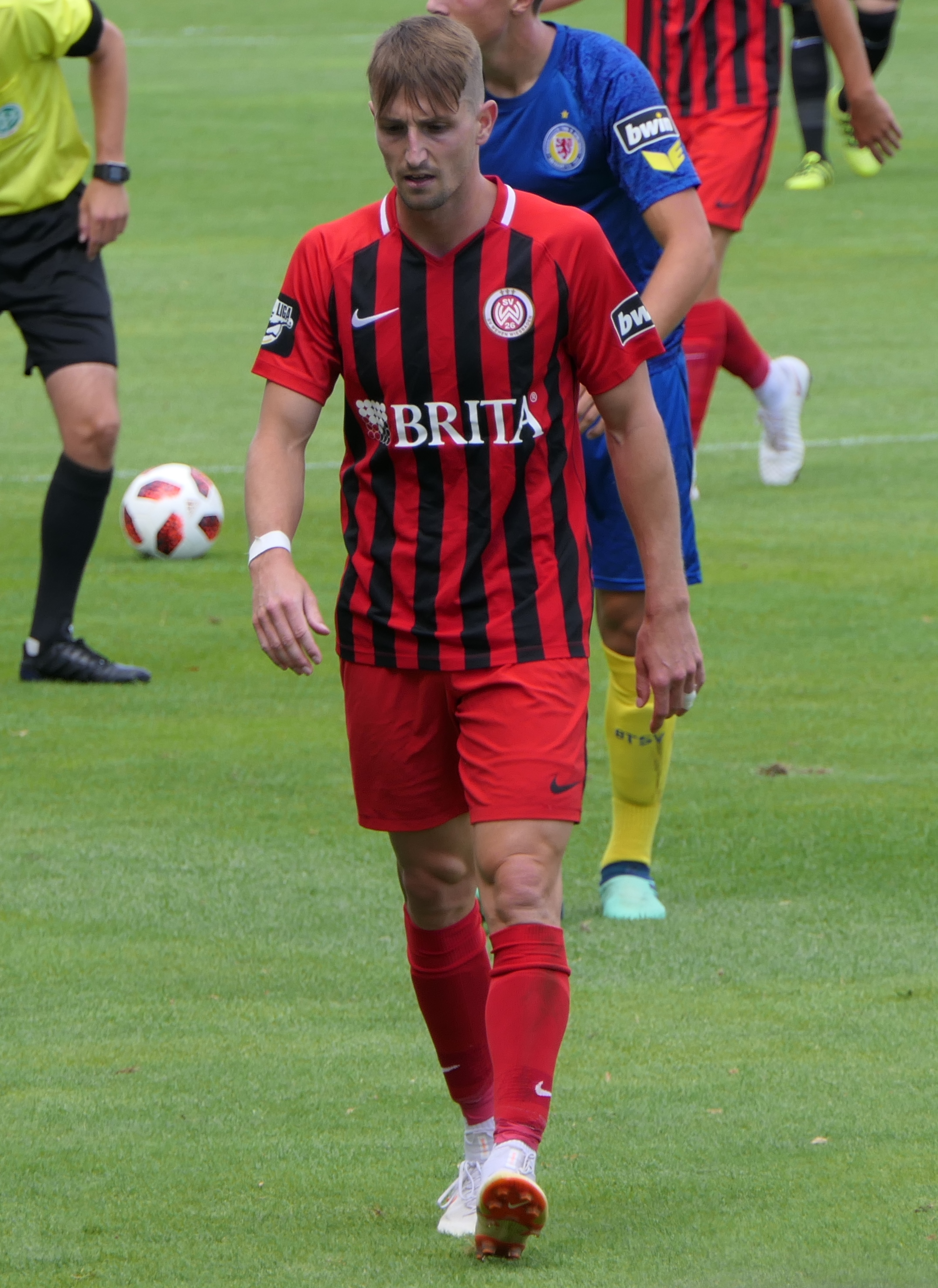 Der Fussballprofi Stephan Andrist im Trikot von Wehen Wiesbaden beim Heimspiel gegen Eintracht Braunschweig am 11.08.2018.